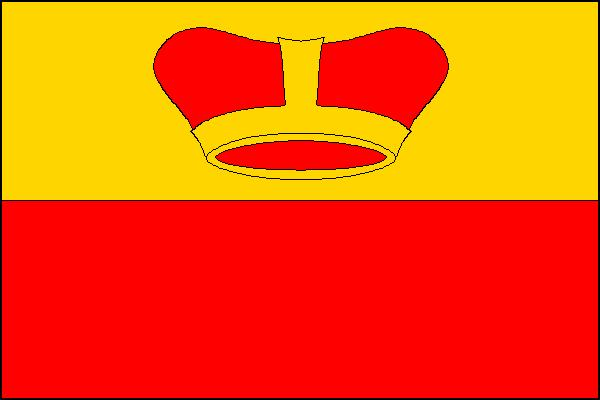 Vlajka obce Dlouhá Brtnice